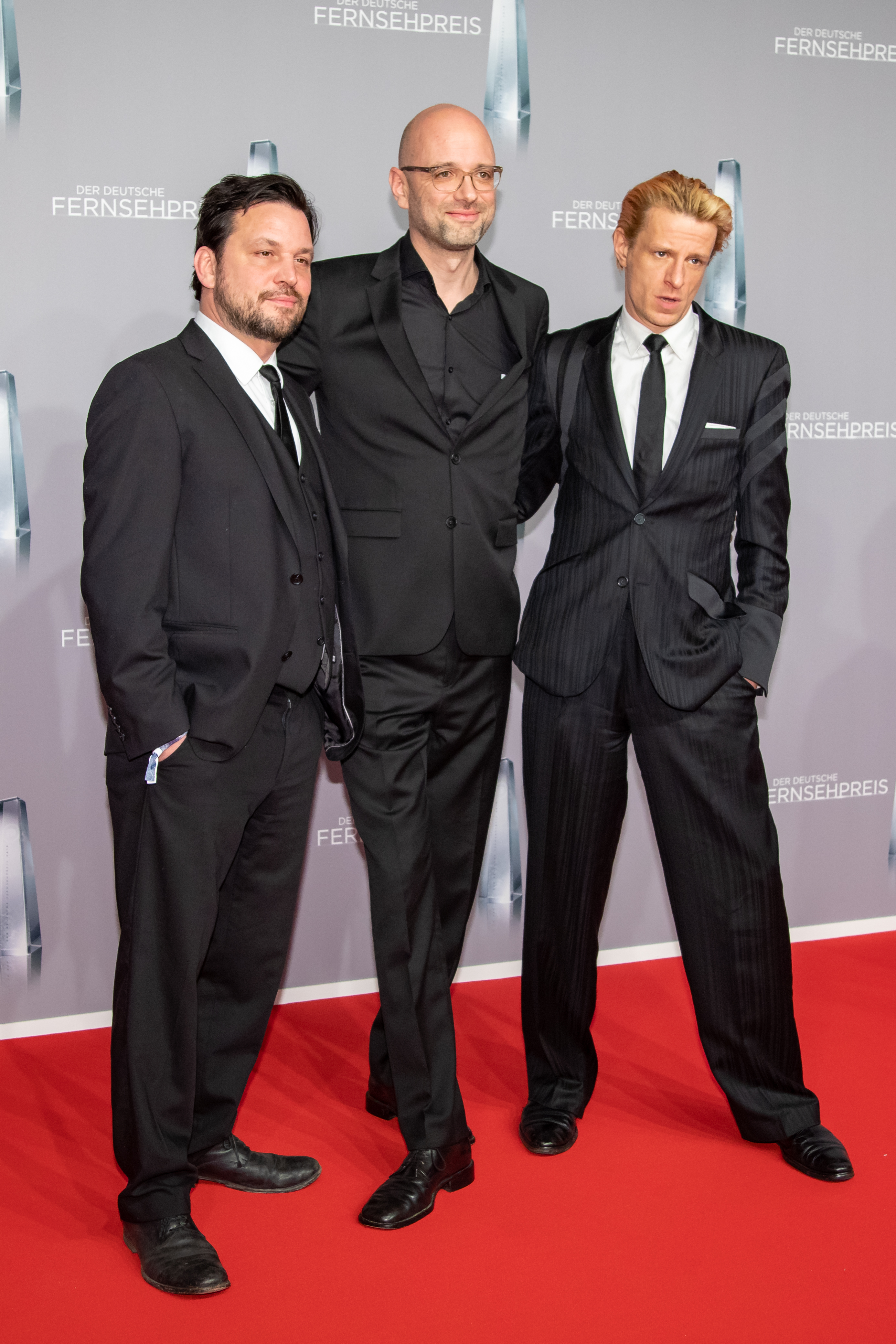 Sascha Alexander Geršak; Kilian Riedhof; Alexander Scheer beim Deutschen Fernsehpreis 2019 in der Düsseldorfer Rheinterrasse. Es handelt sich um Hauptdarsteller und Regisseur des Filmdramas "Gladbeck" (2018).